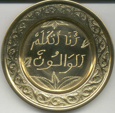 Walon: sicrijhaedje arabe "mi, dji djåze walon"